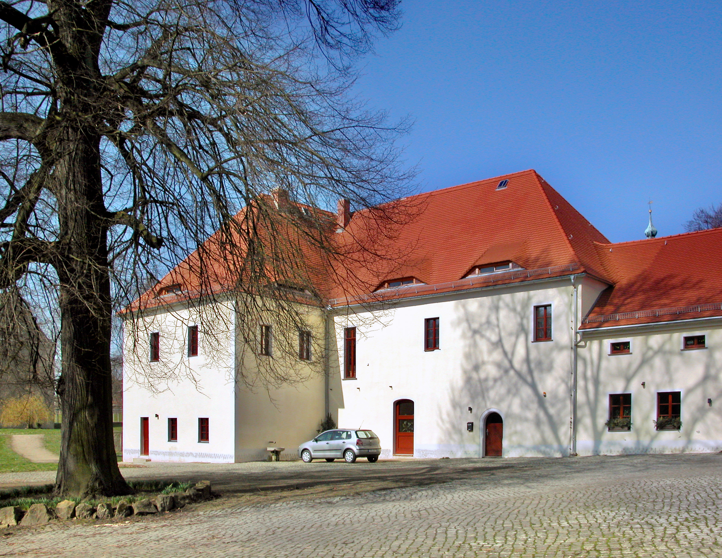 31.03.2009 04769 Sornzig (Sornzig-Ablaß): Ehemaliges Zisterzienserinnenkloster St. Marienthal, Klosterstr. 16 (GMP: 51.212854,13.016662), als Nonnenkloster 1241 gegründet. Im Zuge der Reformation wandelte sich das Kloster in einen Klostergut genannten Landwirtschaftsbetrieb, der zeitweilig dem letzten Bischofs von Meißen gehörte. Im efolge der Bodenreform wurde daraus 1946 ein Volkseigenes Gut, das 1952 mit dem Volksgut Mügeln vereinigt und 1991 aufgelöst wurde. 1996 reprivatisiert. Sicht von Südosten. [DSCN35770.TIF]20090331030.JPG(c)Blobelt